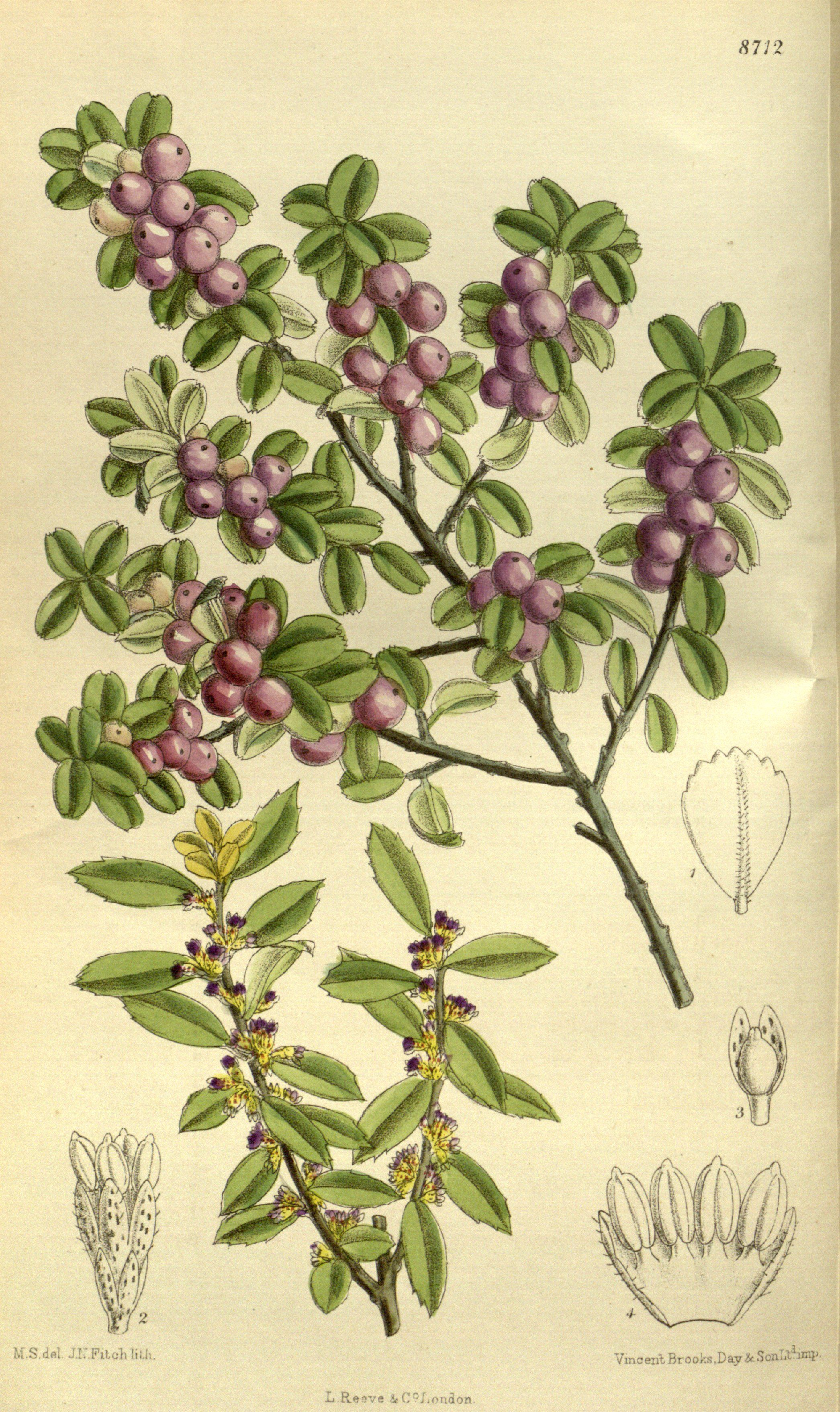 Myrsine africana, Primulaceae, Myrsinoideae